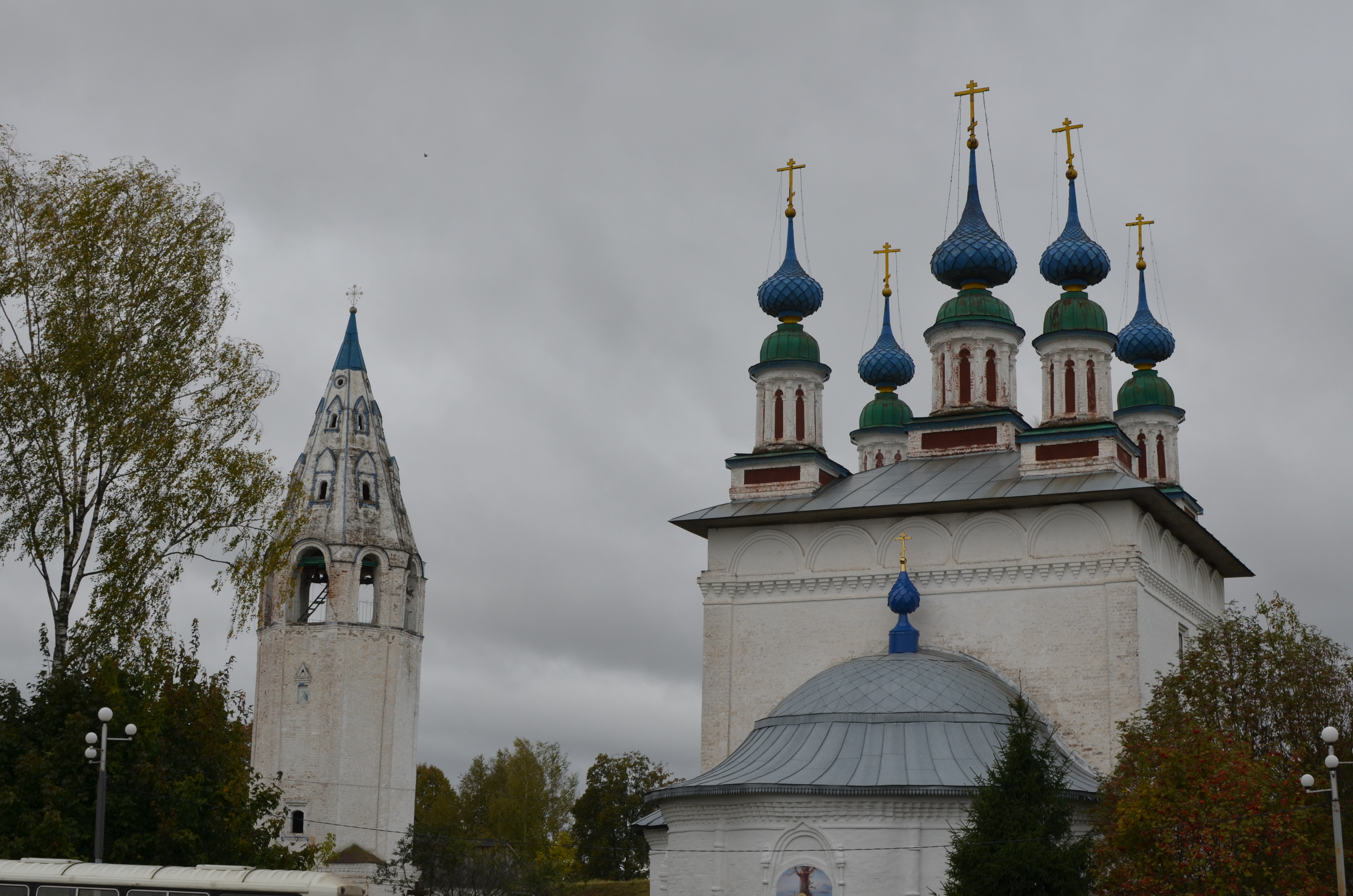 Троицкая церковь (справа) и Колокольня (слева) поселка Лух Ивановской области, расположенные на главной площади. 30.09.2017.